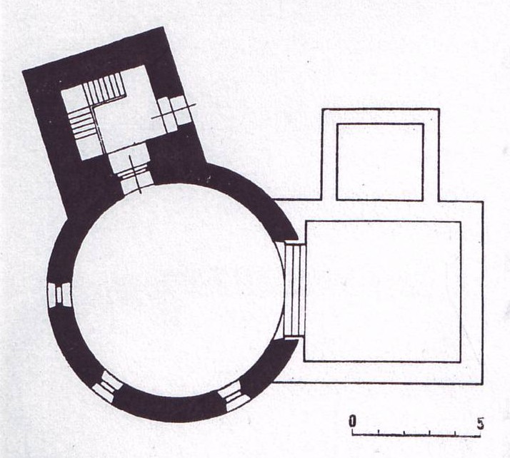 Půdorys kostela svatého Petra a Pavla na Budči